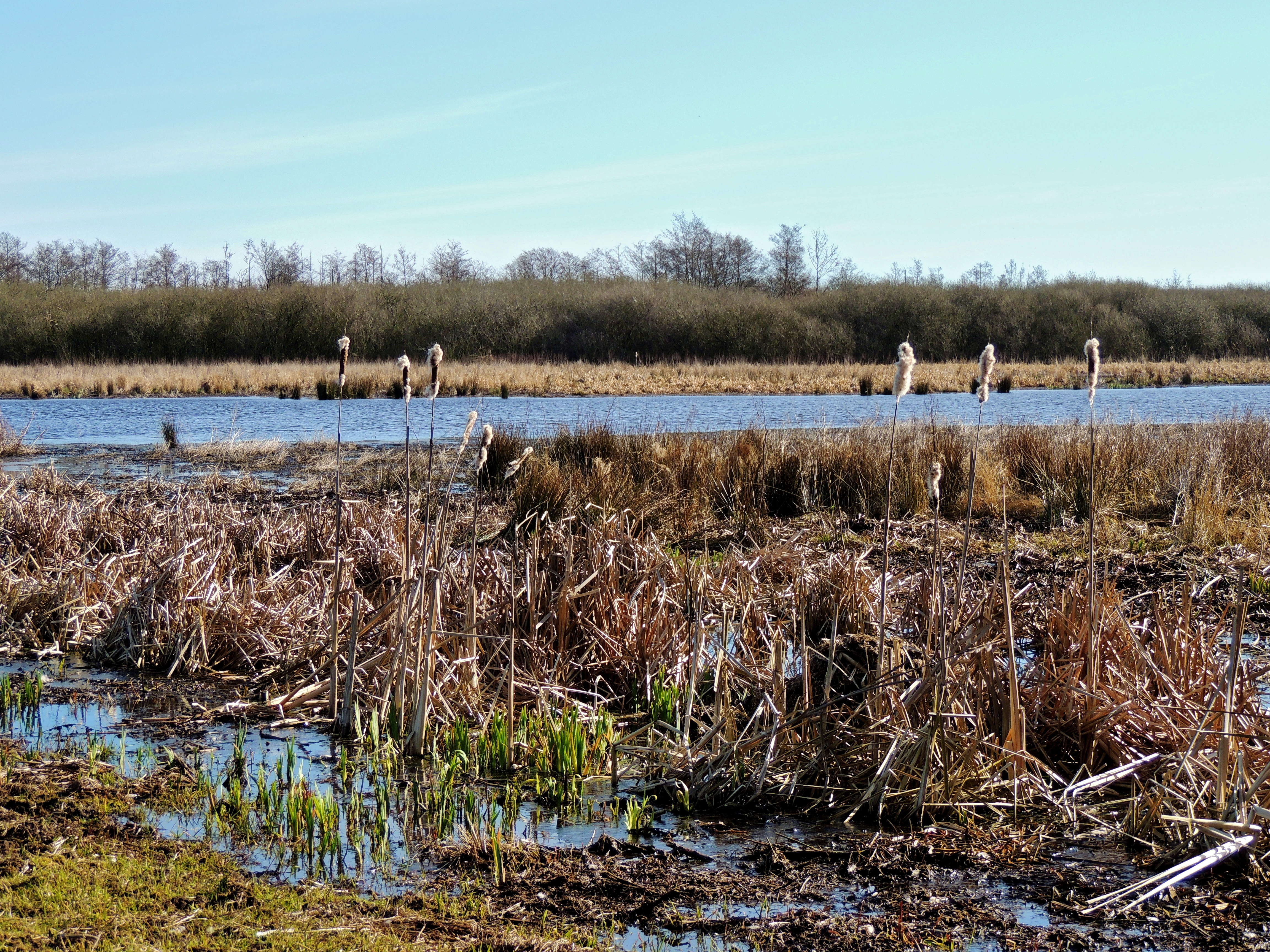 Naturschutzgebiet „Meerbruch“ nahe Winzlar am Steinhuder Meer, Region Hannover (Niedersachsen, Deutschland)